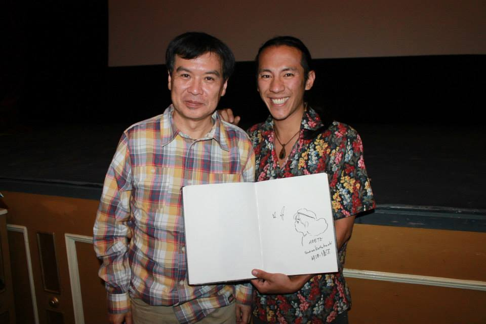 Festival International de Cine de Aguascalientes MEXICO-2014 Sunao Katabuchi's dedicace on my sketchbook!